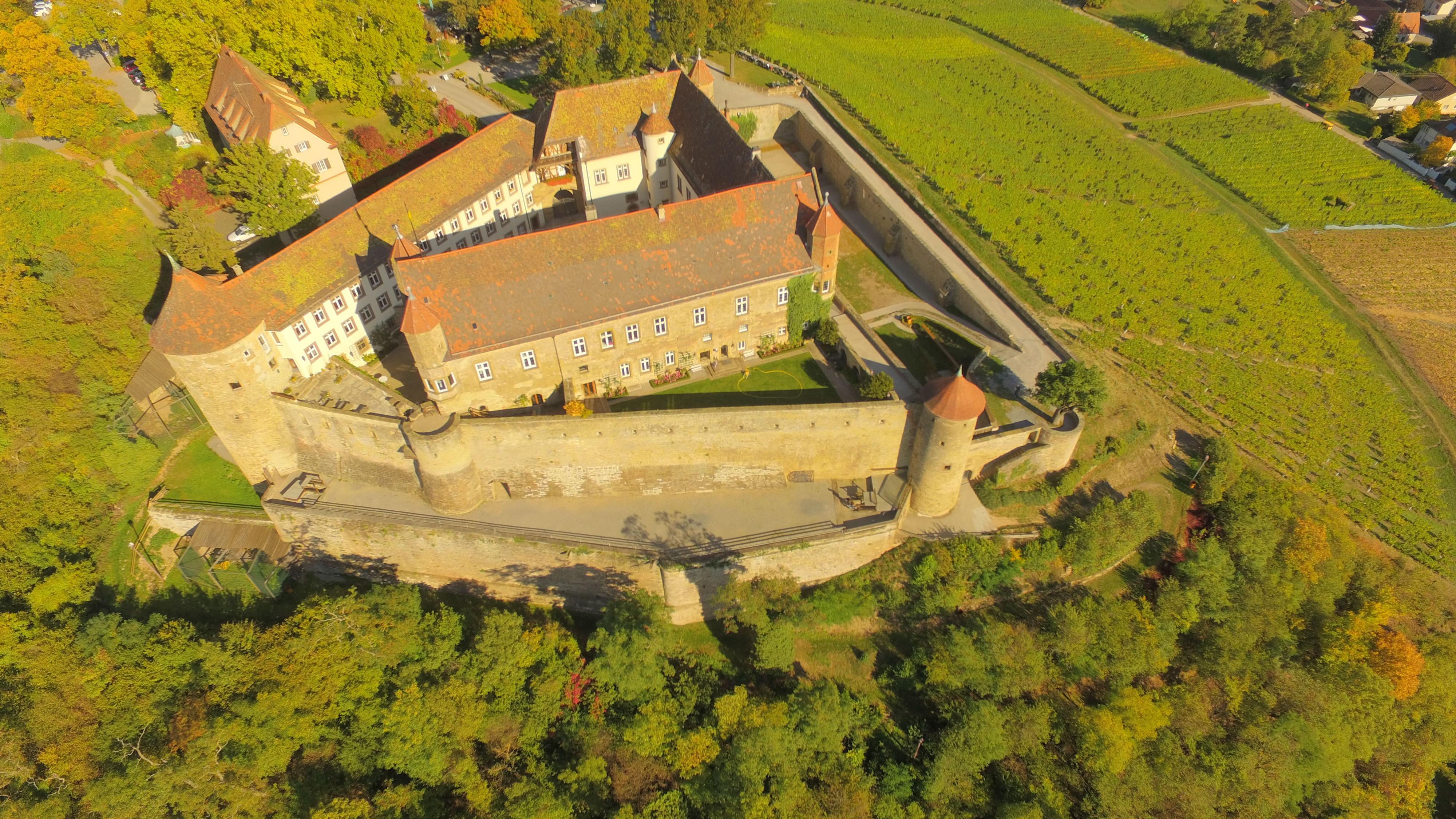 Burg Stettenfels aus West